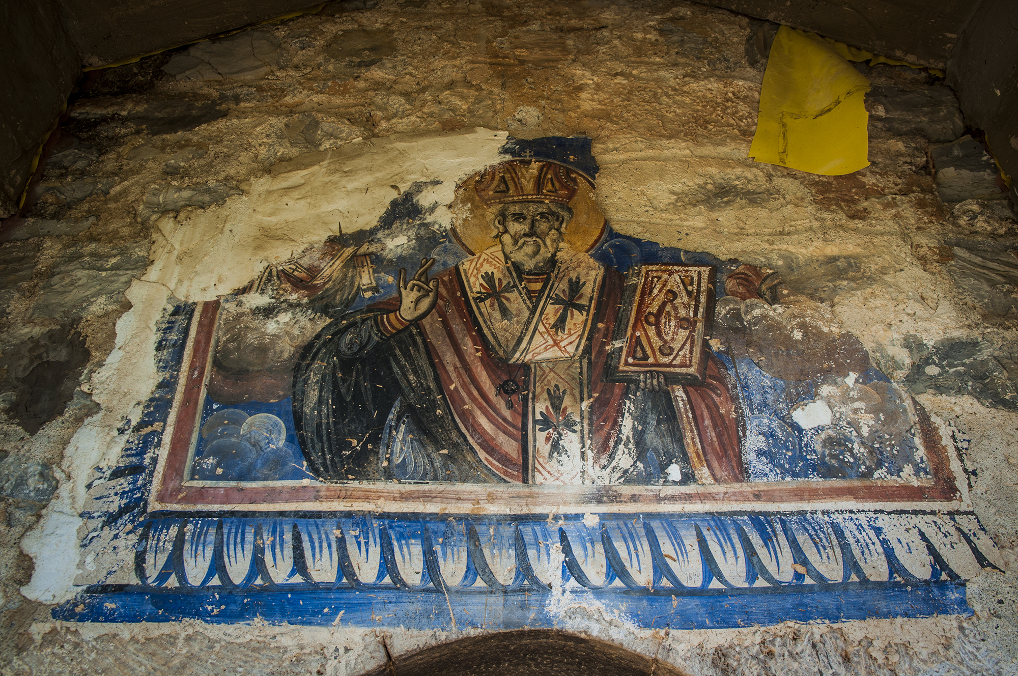 Фреска пред влезот во црквата Свети Никола во Присовјани